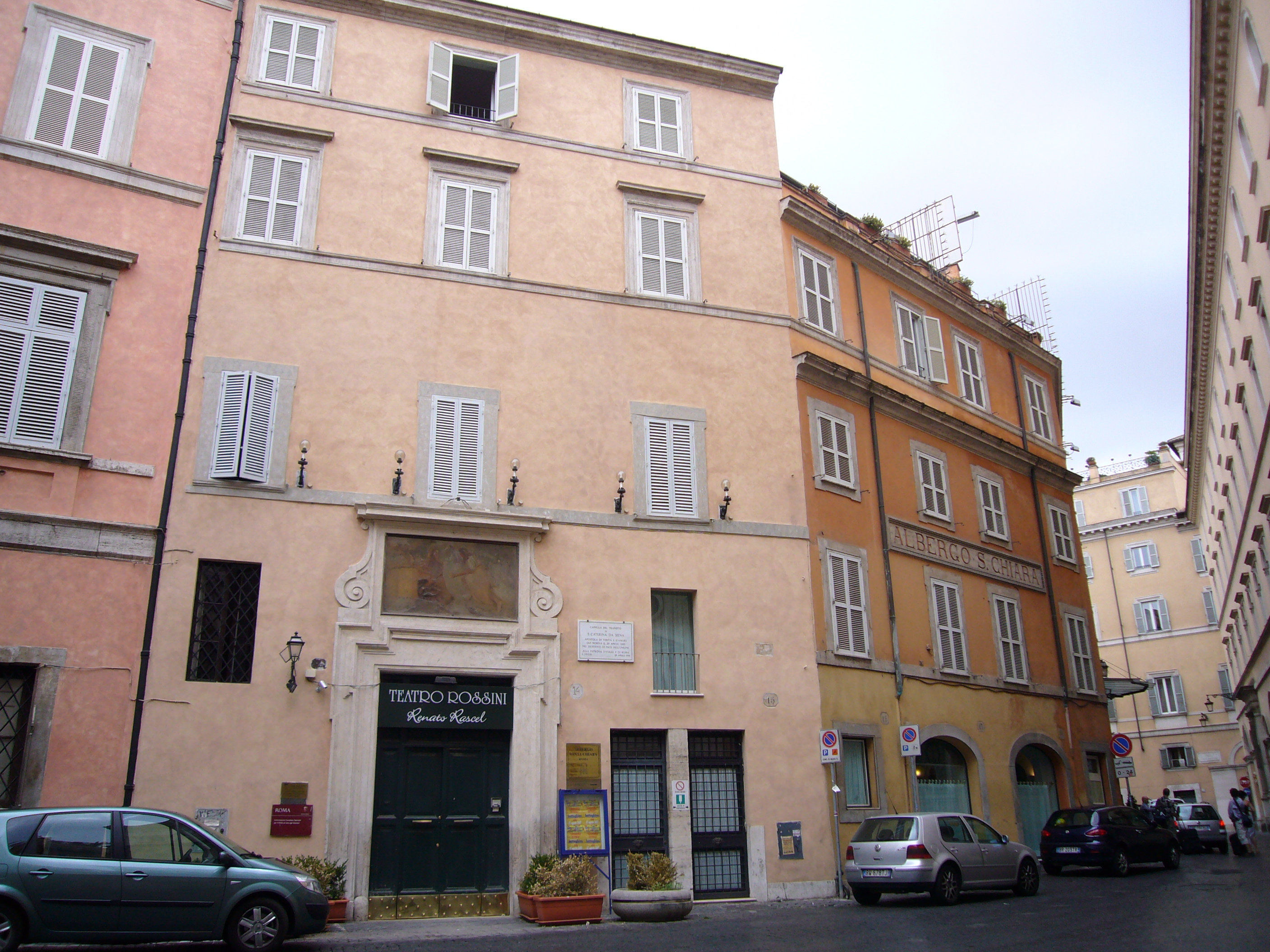 Roma, piazza S. Chiara: teatro Rossini e albergo S. Chiara.